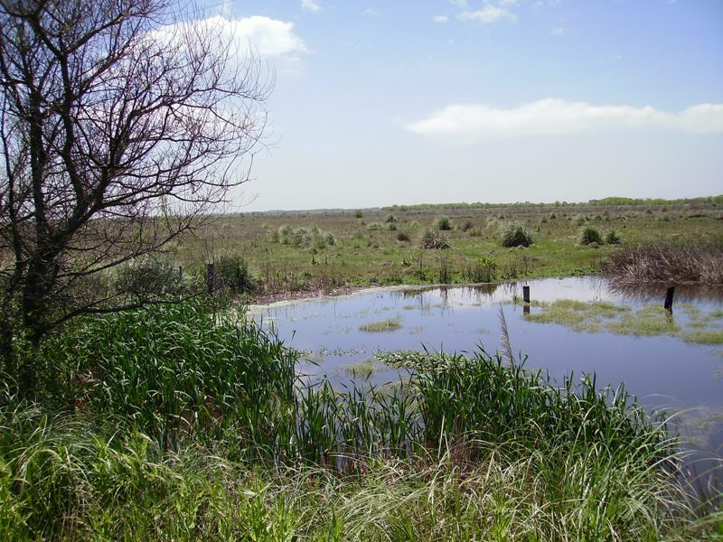 Vista de la Llanura Pampeana, Reserva Ecologica Otamendi.